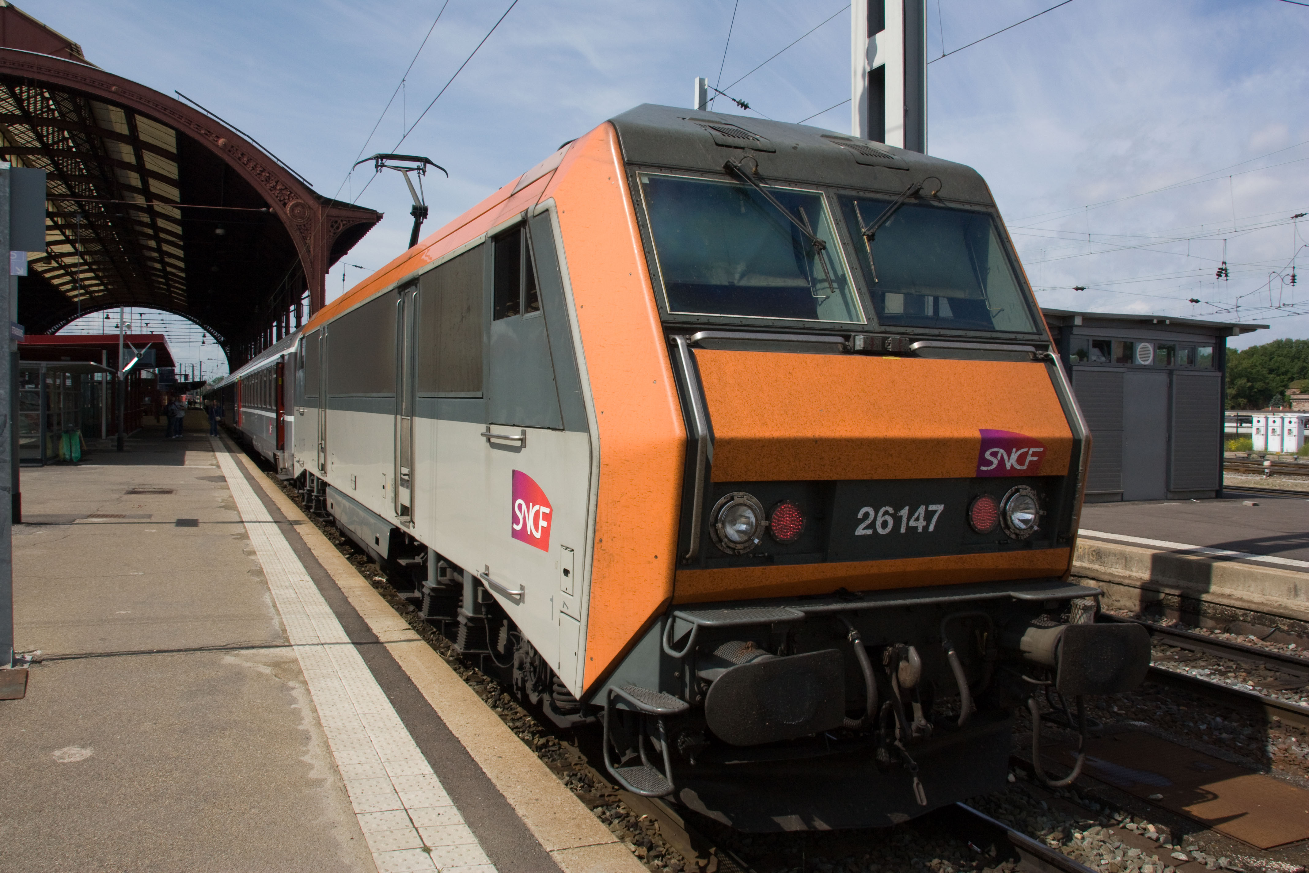 Lococomotive BB26000 en gare de Strasbourg / Alsace - France